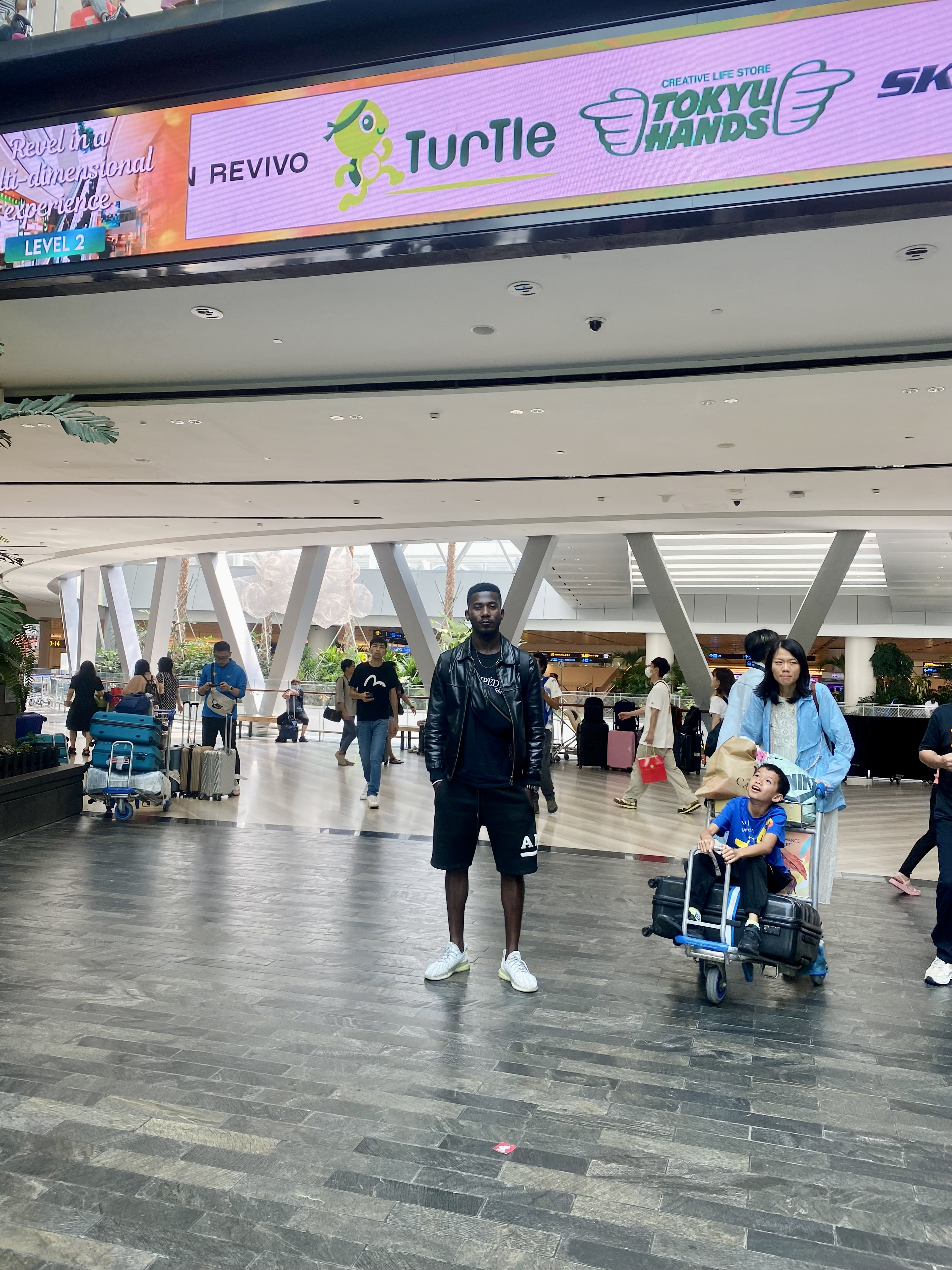 visite technique